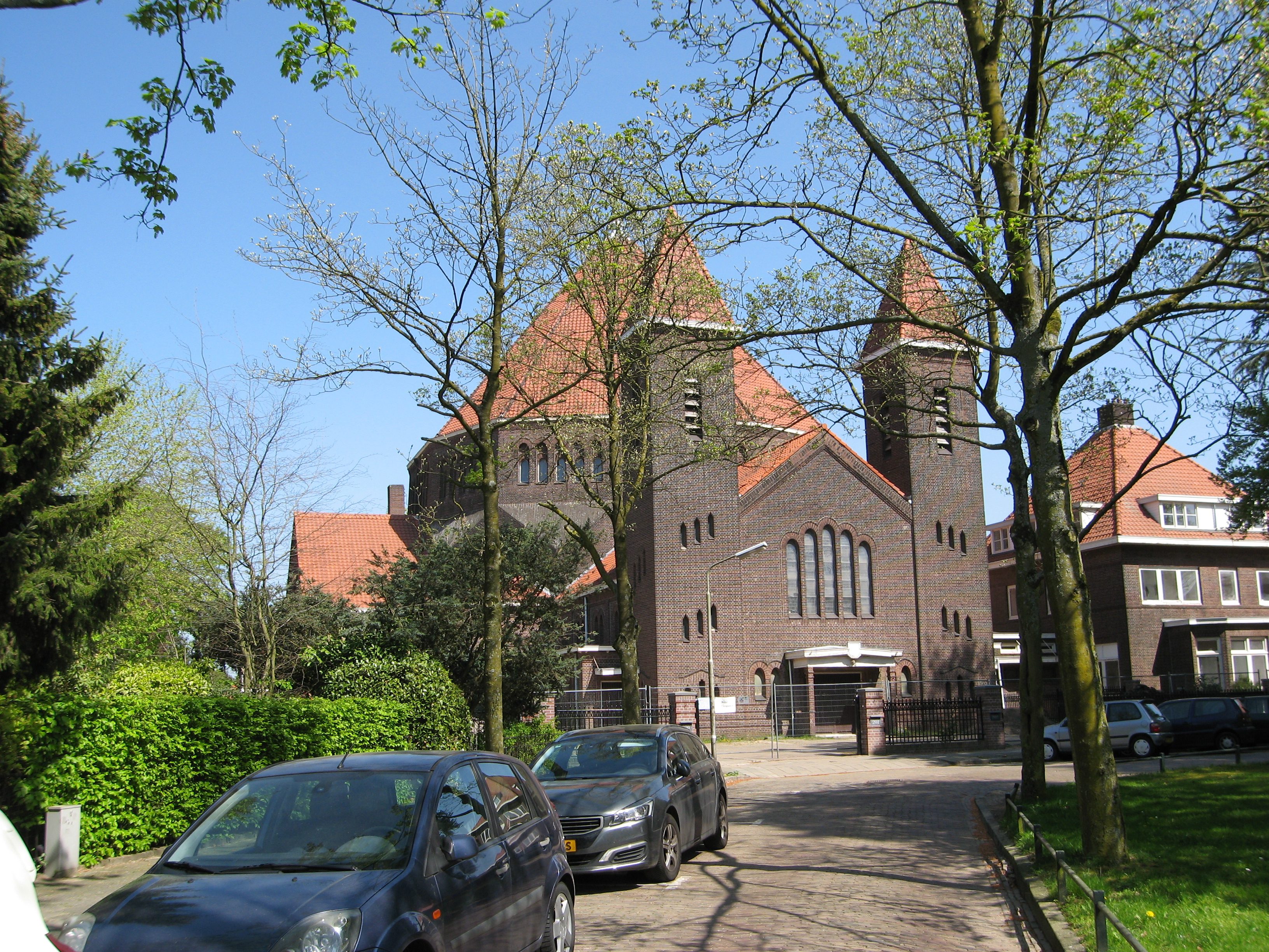 Sint-Stephanuskerk Nijmegen